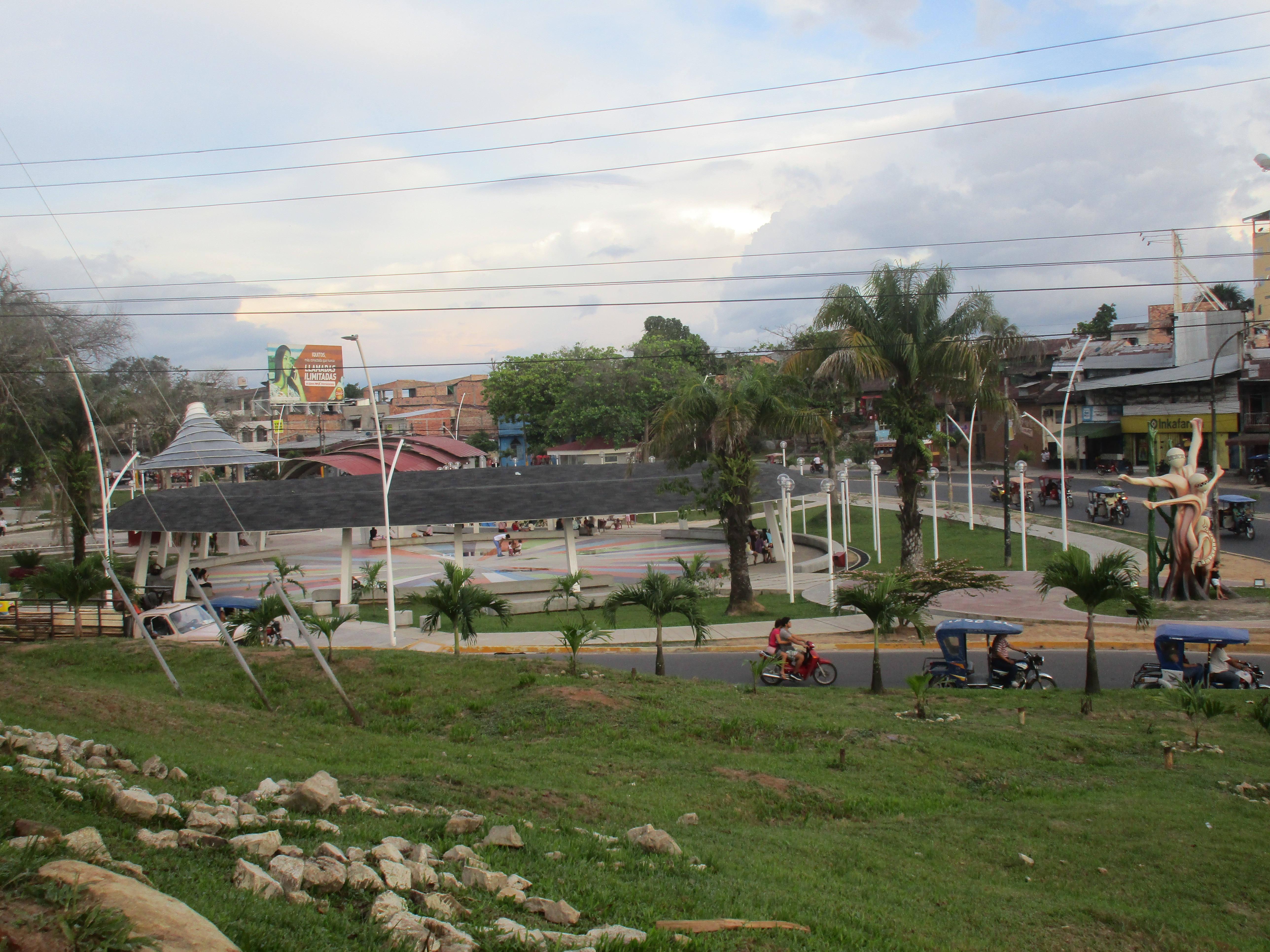 Plaza Francisco Bolognesi de Iquitos